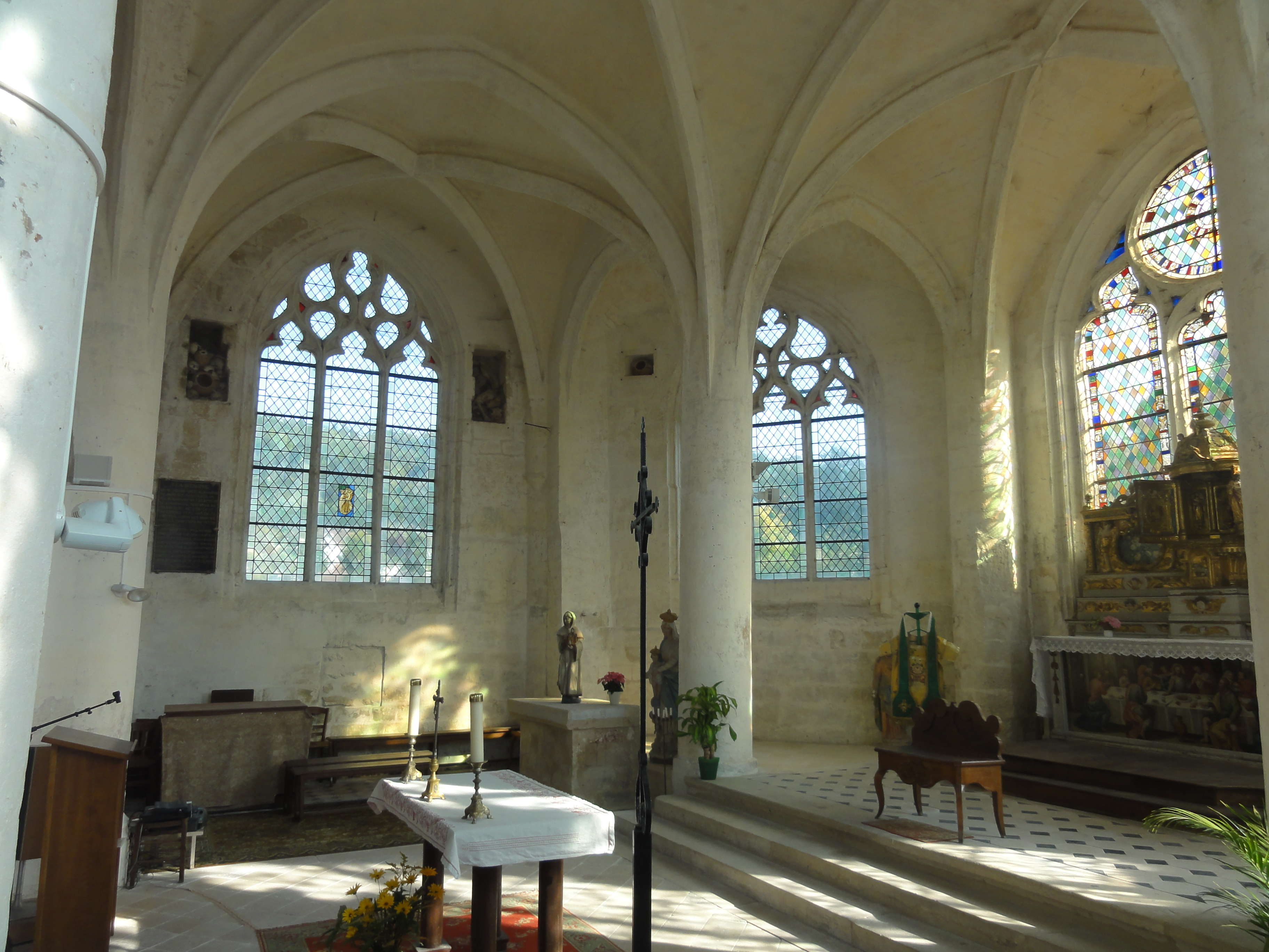 Intérieur de l'église - voir titre.